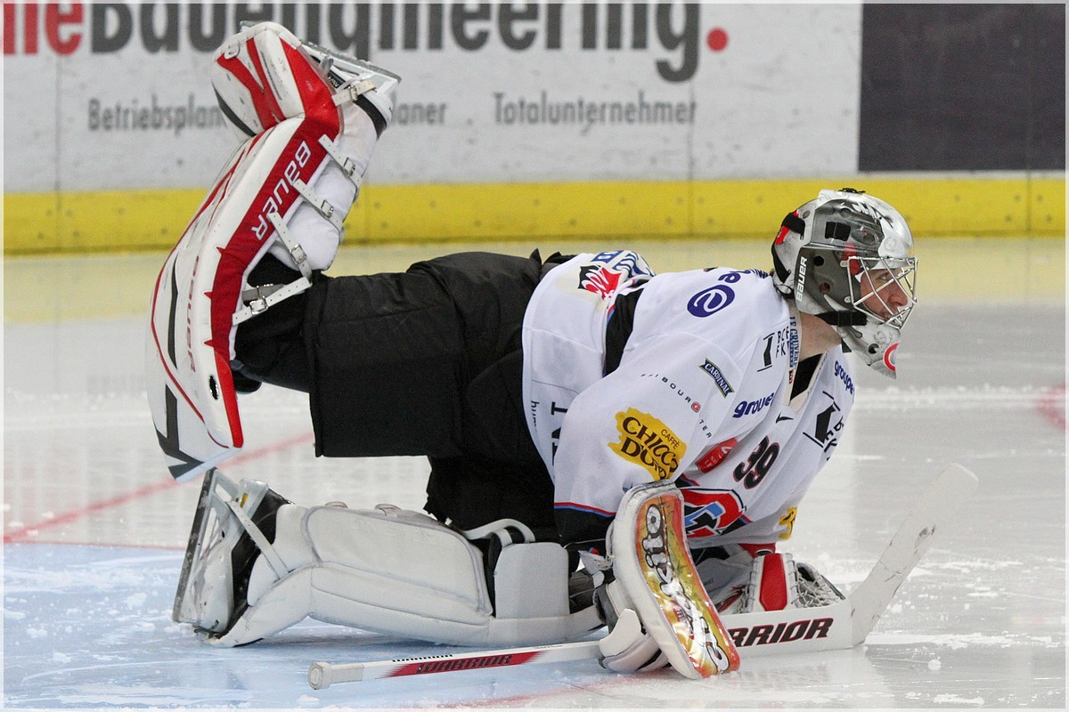 Le gardien de Fribourg-Gottéron Cristobal Huet lors de l'échauffement avant un match contre les ZSC Lions, 2 novembre 2010.